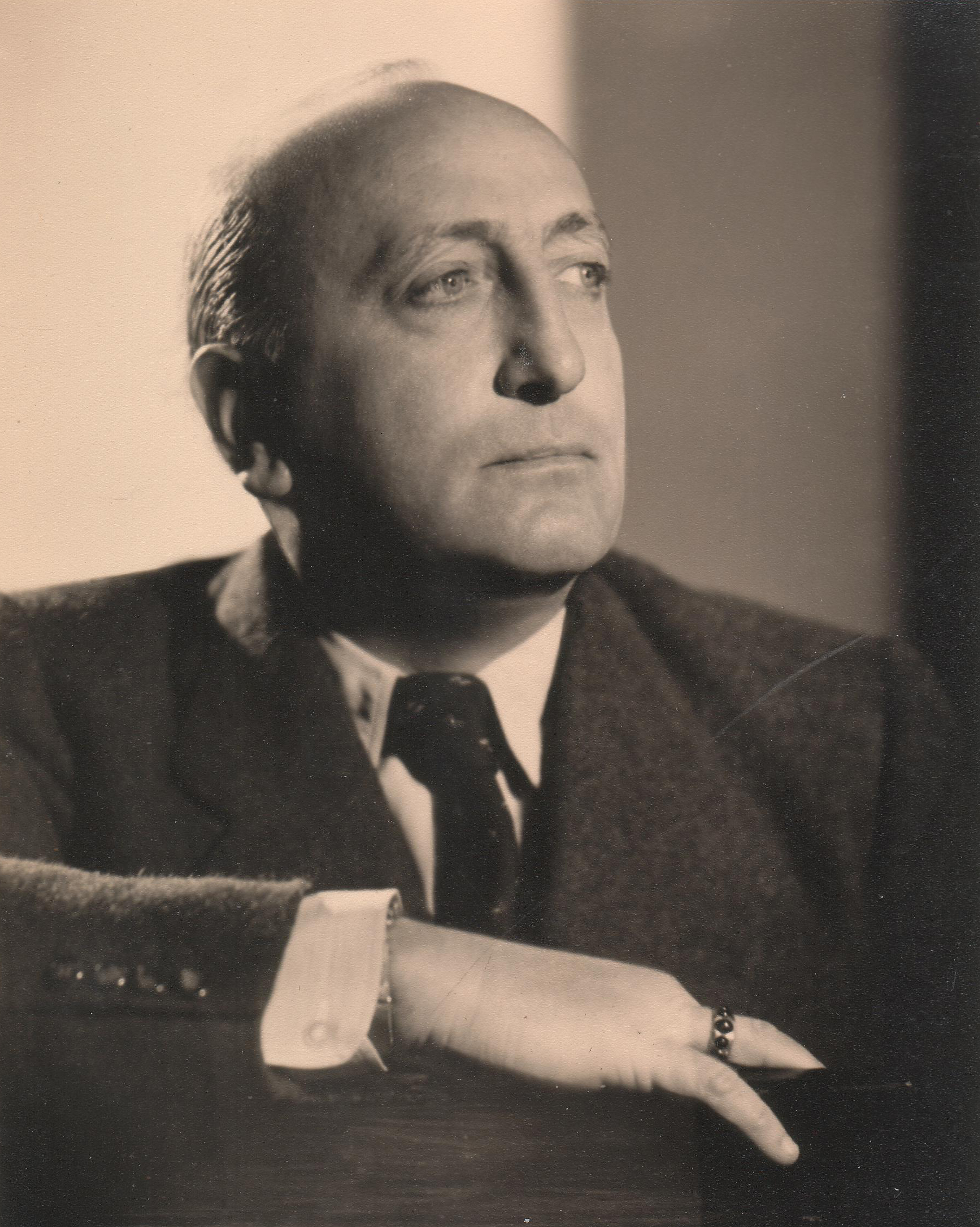 Beschreibung: Regisseur Karl Ritter Quelle: Eigenaufnahme